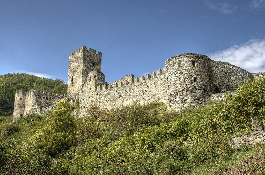 Burgruine Hinterhaus